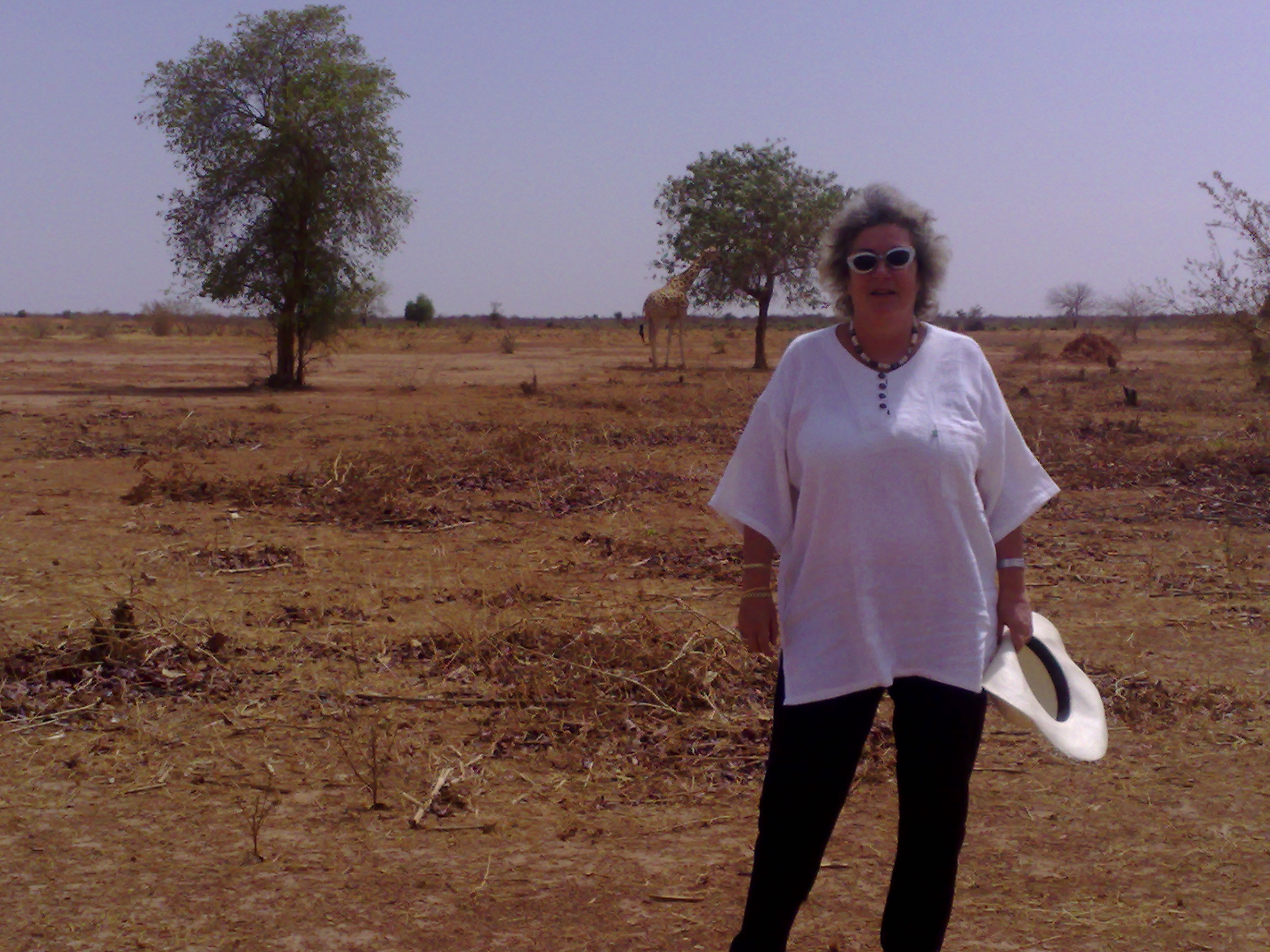 Soledad Cazorla fotografiada en Níger un viaje realizado con motivo del III Encuentro de mujeres españolas y africanas para un mundo mejor.